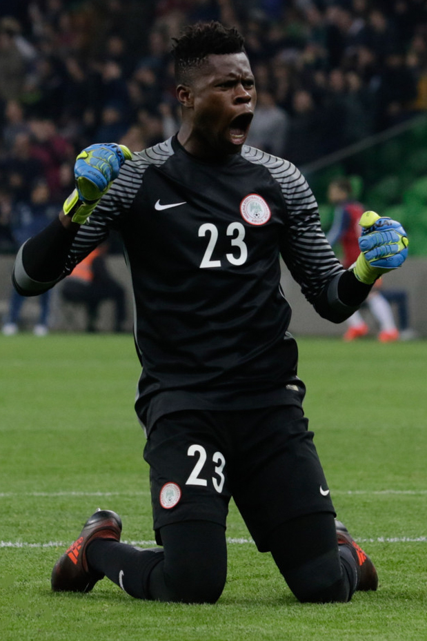 Аргентина без Месси опростоволосилась в Краснодаре